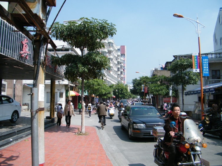 达濠红桥路